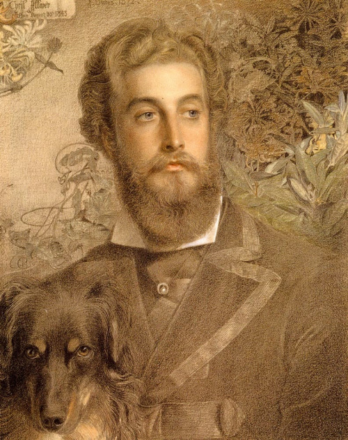 Portrait de Cyril Flower, Lord Battersea (1872), par Frederick Sandys.